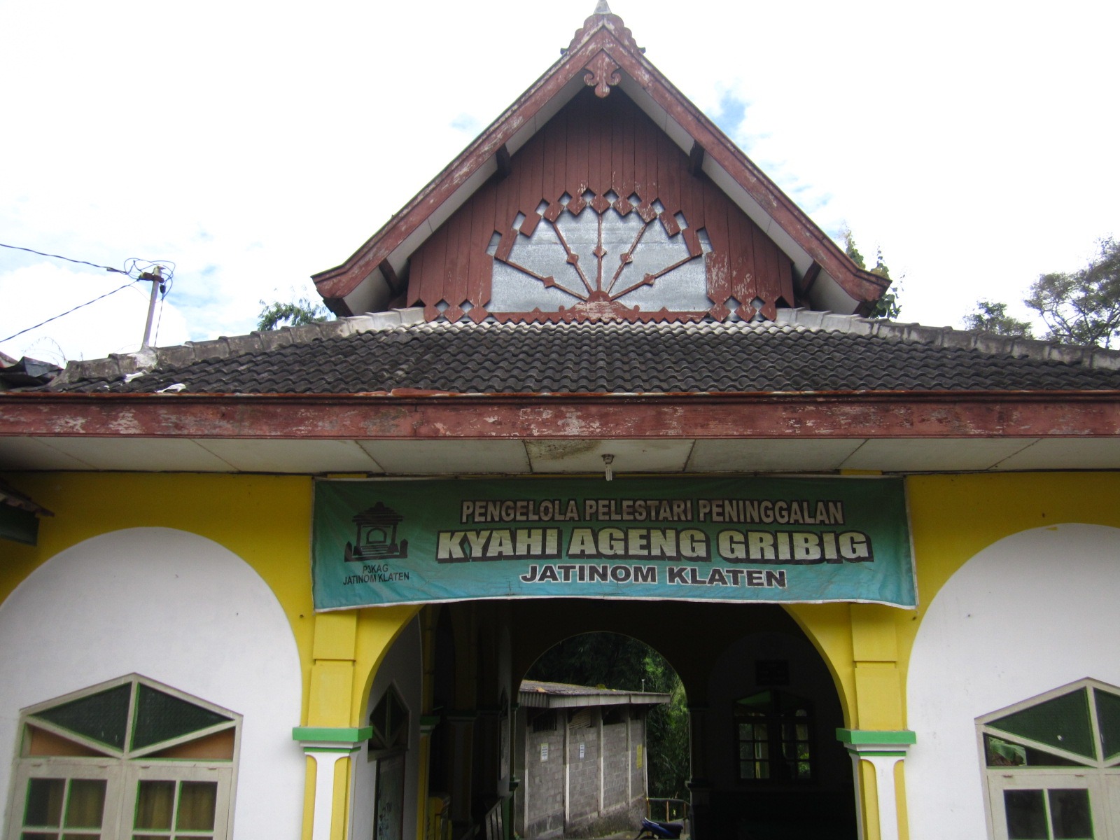 Gerbang pertama di selatan mesjid menuju kompleks pemakaman Ki Ageng Gribig